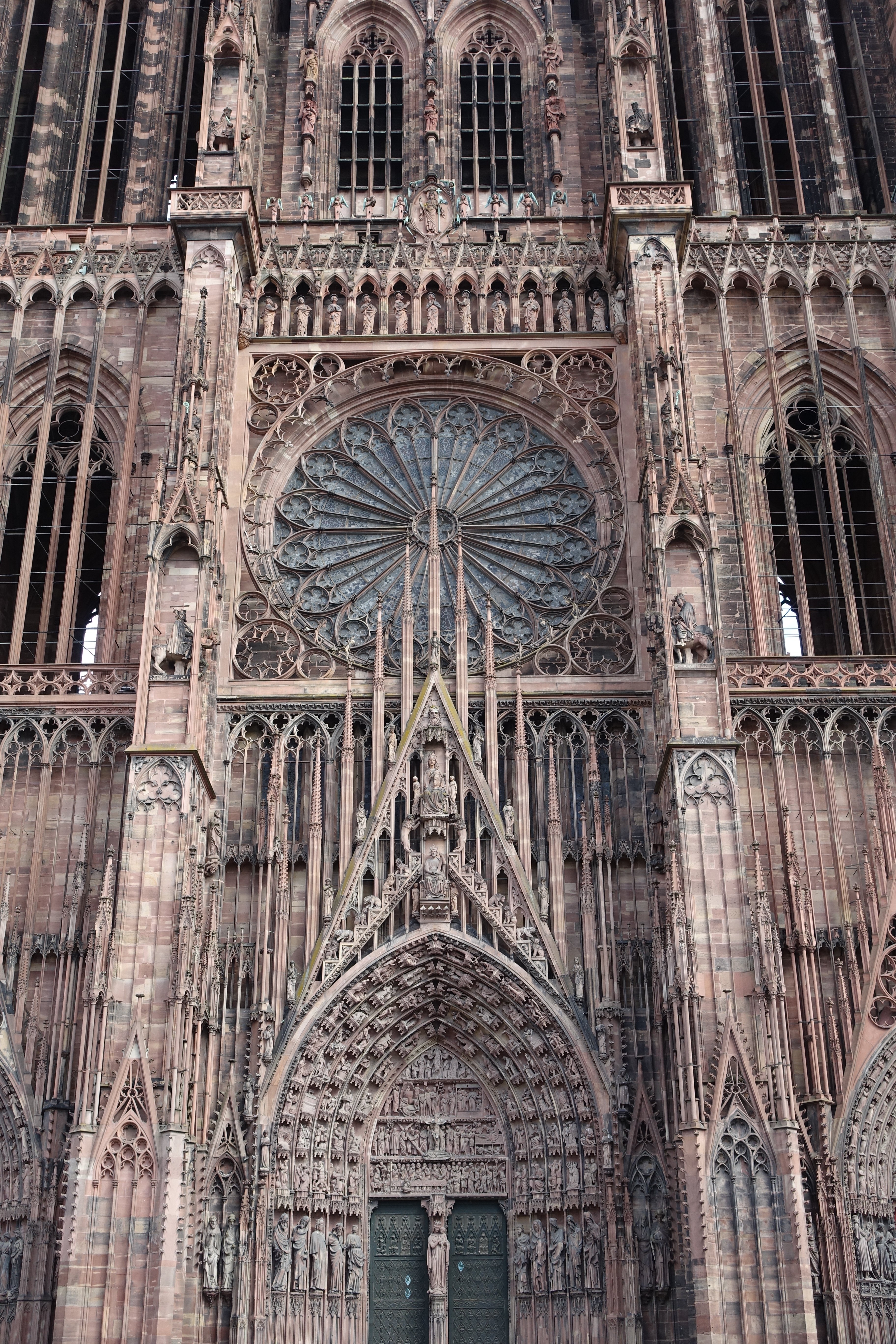 Cathédrale Notre-Dame de Strasbourg @ Strasbourg